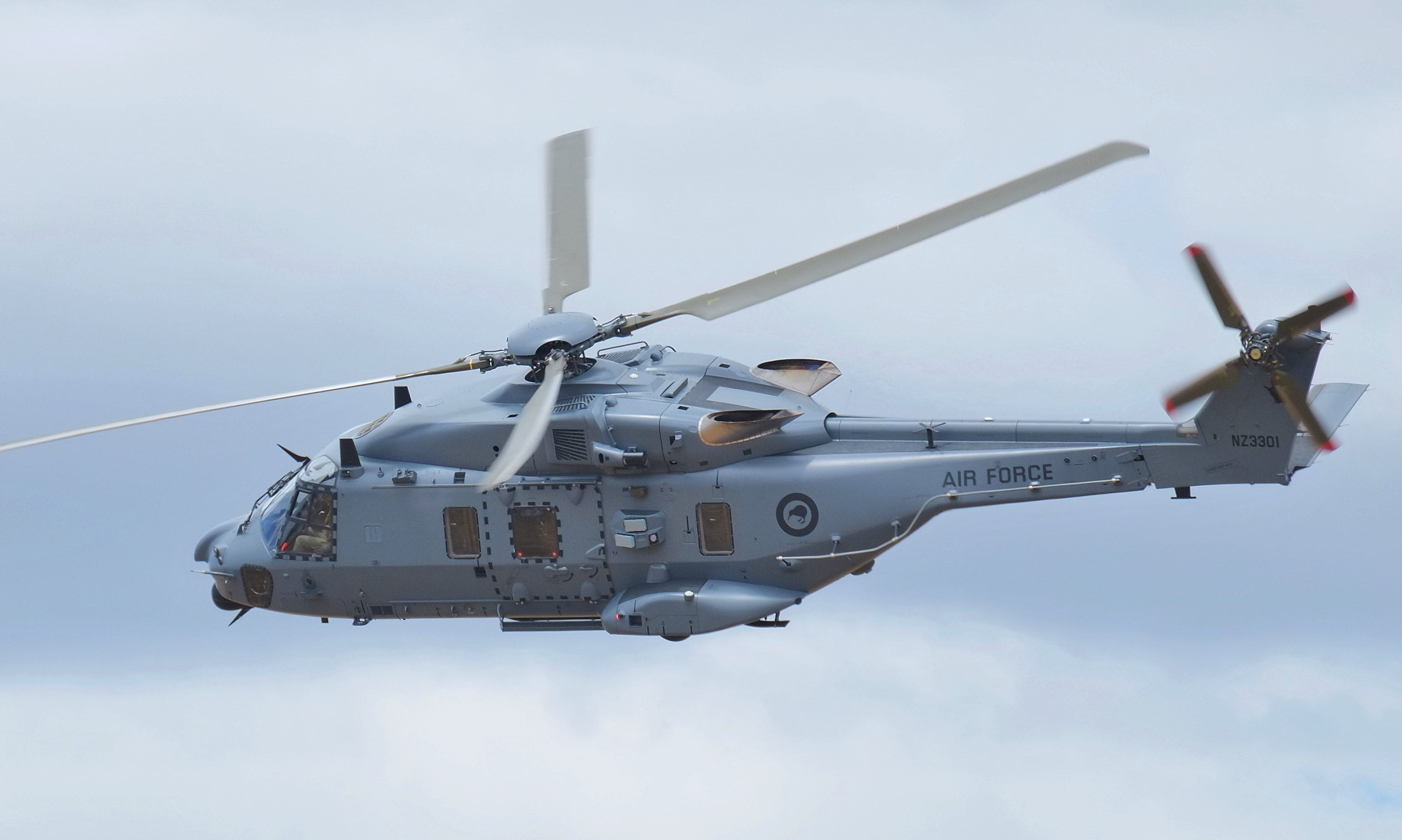 RNZAF NH90 banking